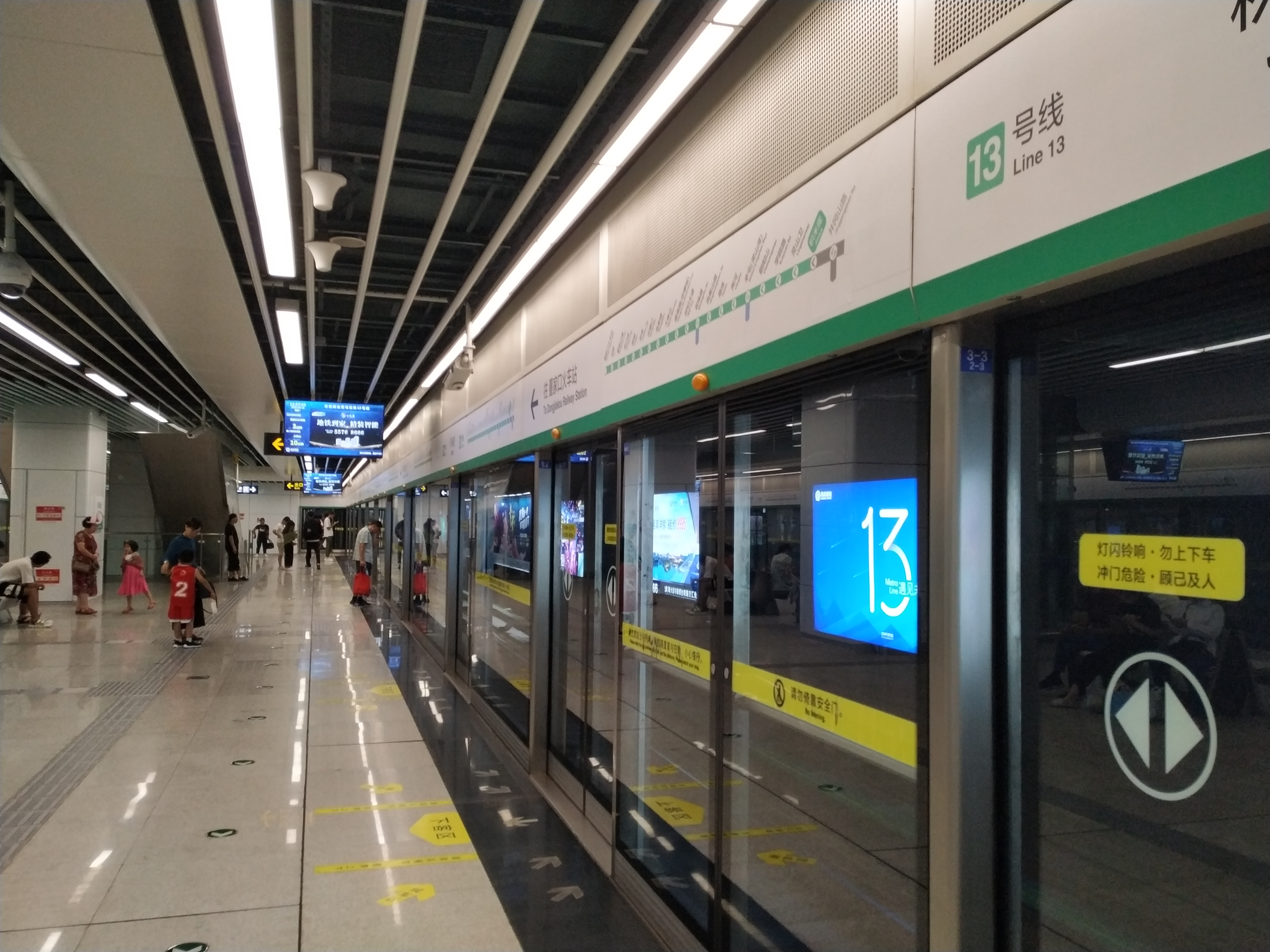 中文（中国大陆）: 积米崖站站台